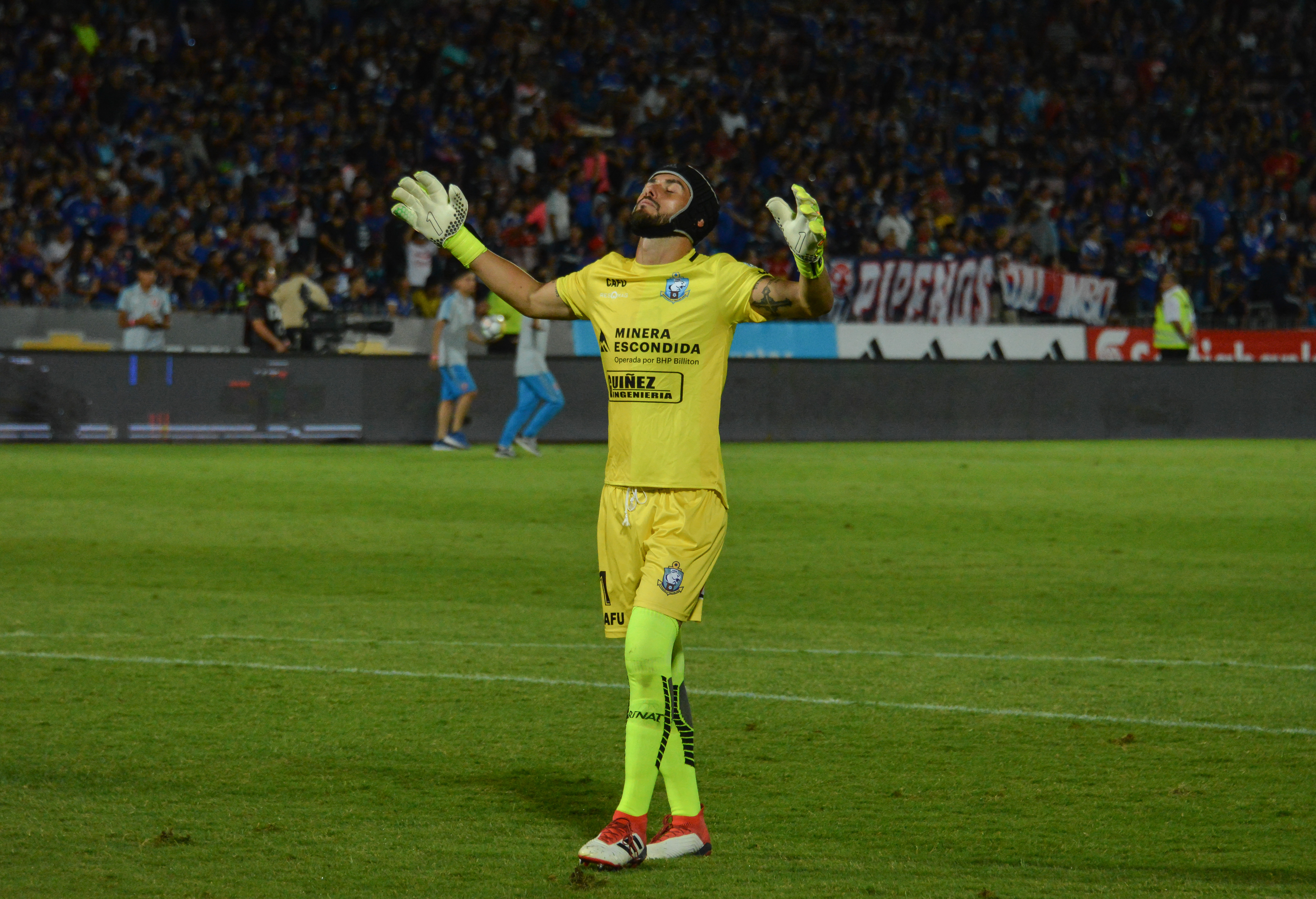 Paulo Garcés, Universidad de Chile v Deportes Antofagasta, Estadio Nacional, Santiago, Chile.